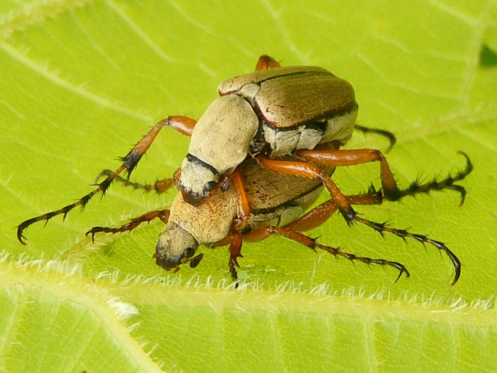 Macrodactylus subspinosus (Scarabée du rosier)